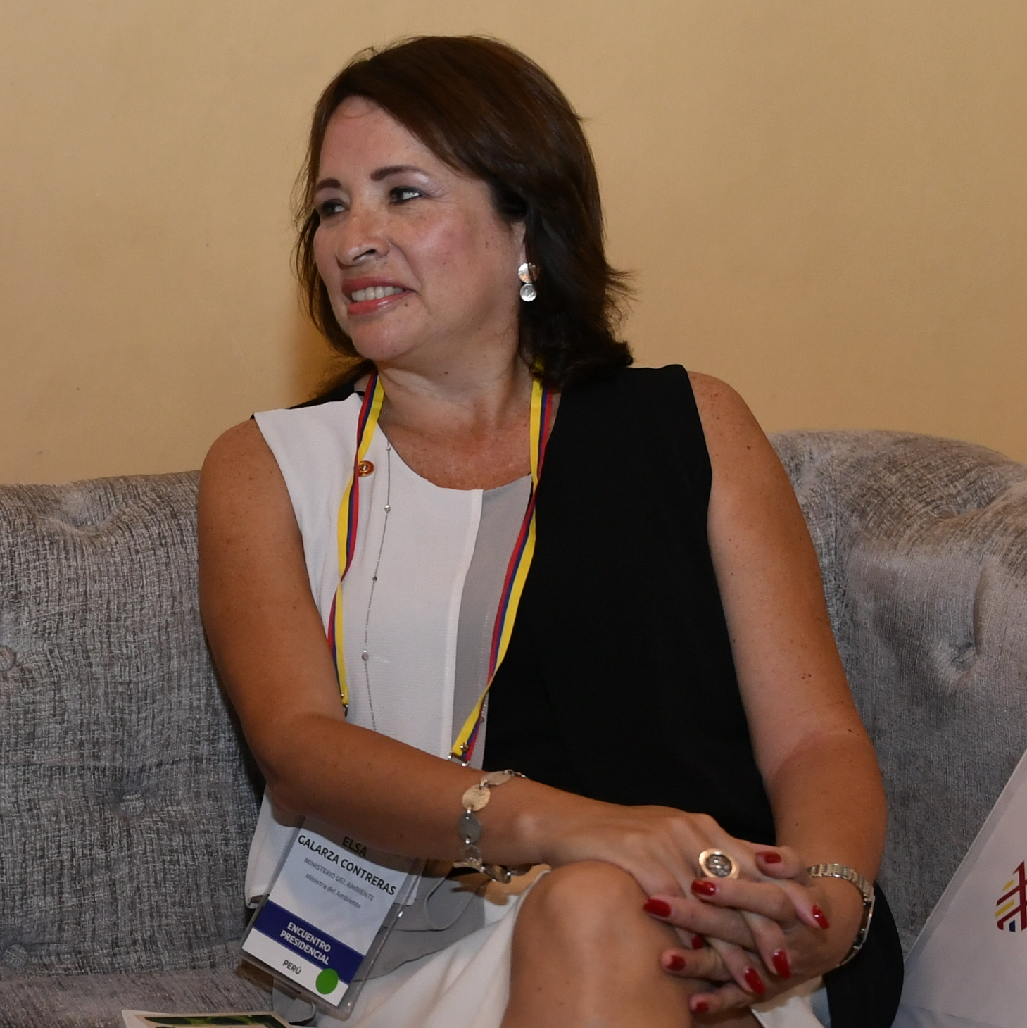 Inauguración IV Gabinete Binacional Colombia – Perú, en Cartagena de las Indias, Colombia. Bloke and Elsa Galarza